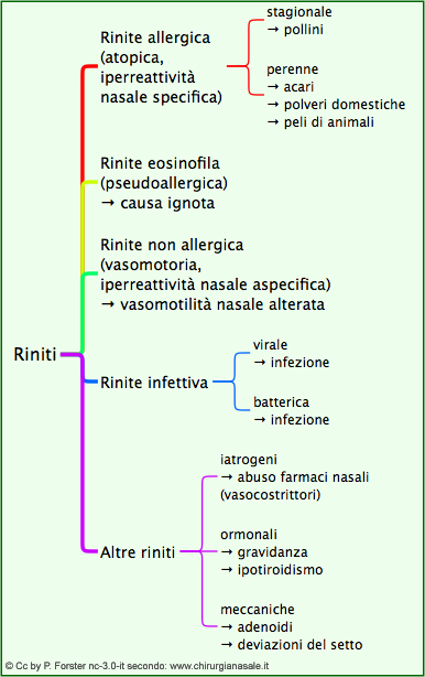 Classificazione rinite: allergica, atopica, eosinofila, vasomotoria, infettiva, virale, batterica, iatrogena, ormonale, meccanica